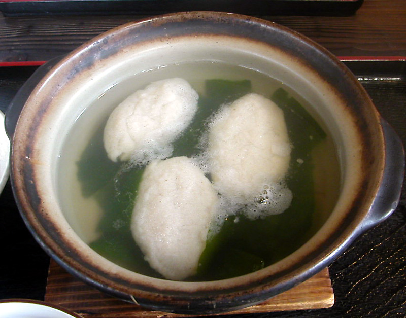 撮影者：小太刀 そばがき そば粉をかき混ぜて固めてお湯に入れたものです。そばつゆなどにつけて食べます。